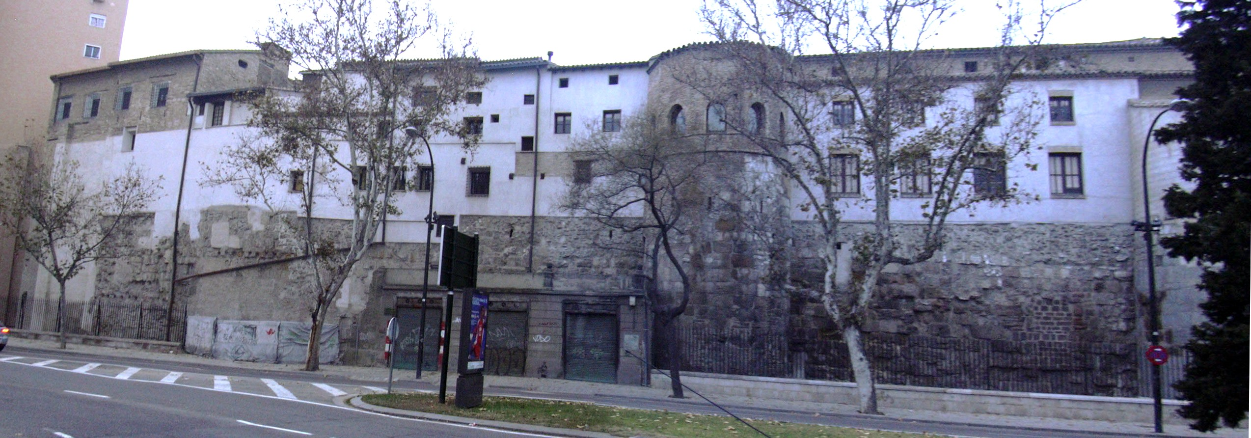 Convento del Santo Sepulcro en Zaragoza Construido sobre las murallas romanas.